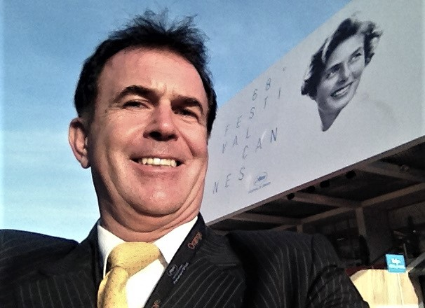 Roger Steinmann au festival de Cannes 2015